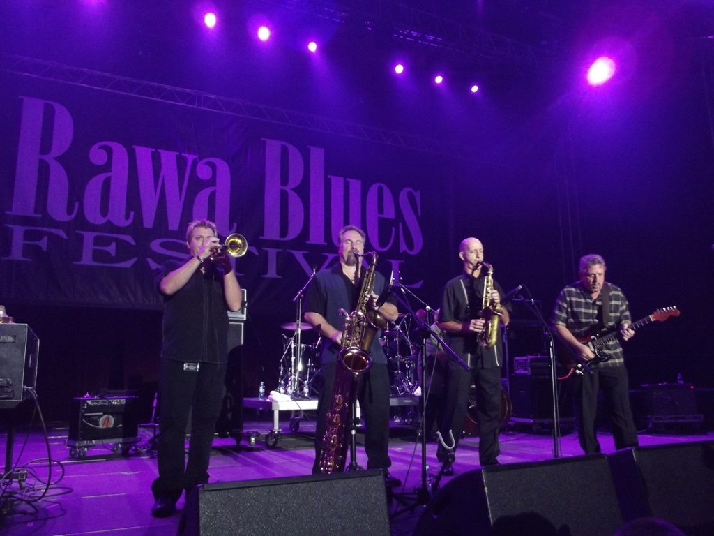 Zdjęcie zrobione podczas 32. Rawy Blues Festival w katowickim Spodku.